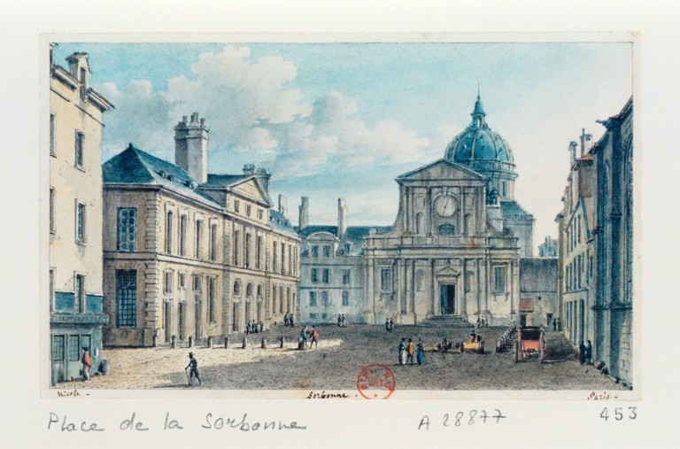 La place et la chapelle de la Sorbonne, par Victor Jean Nicolle (1754-1826)